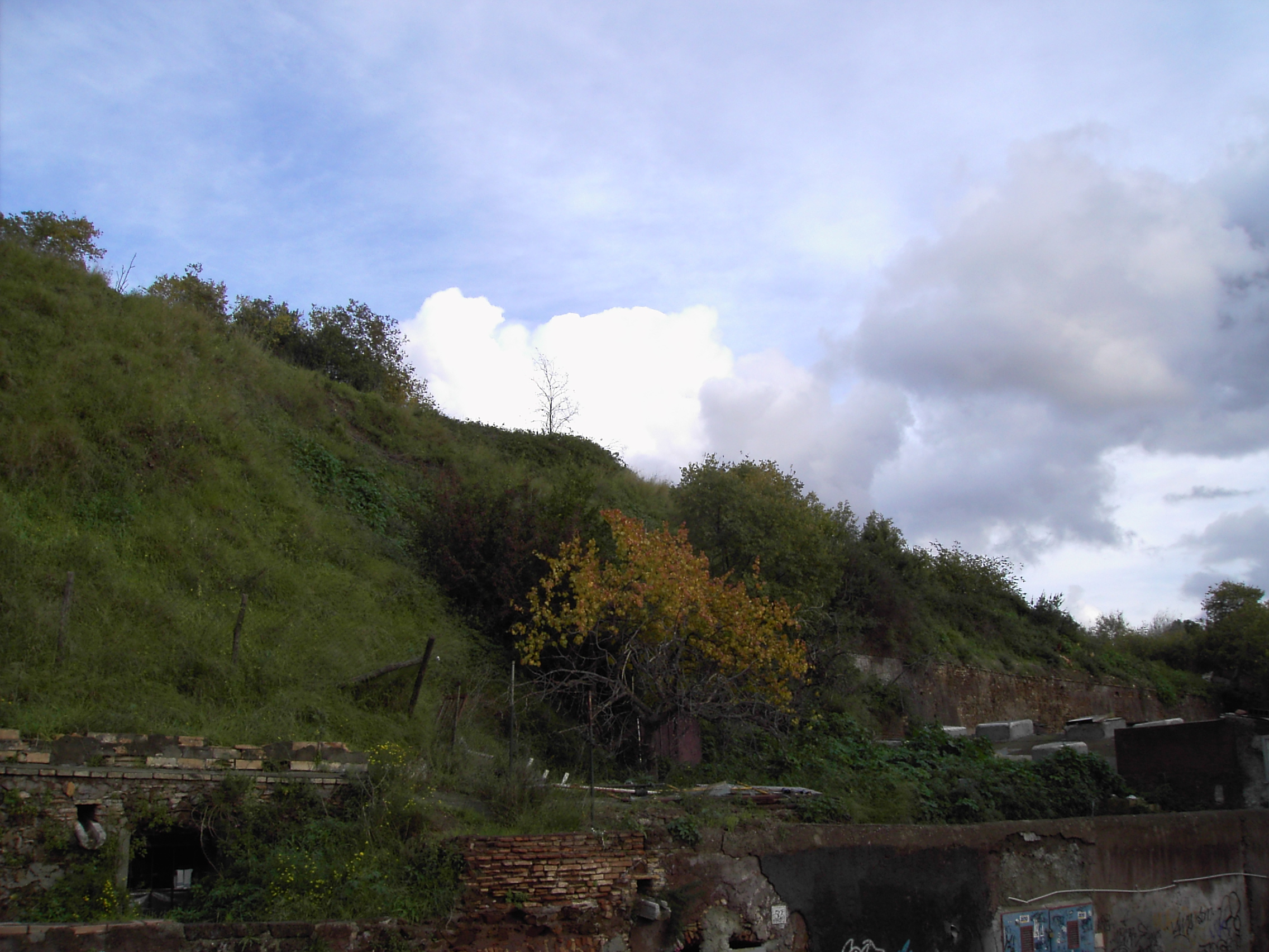 Roma, Testaccio: il monte dei cocci "al selvatico"